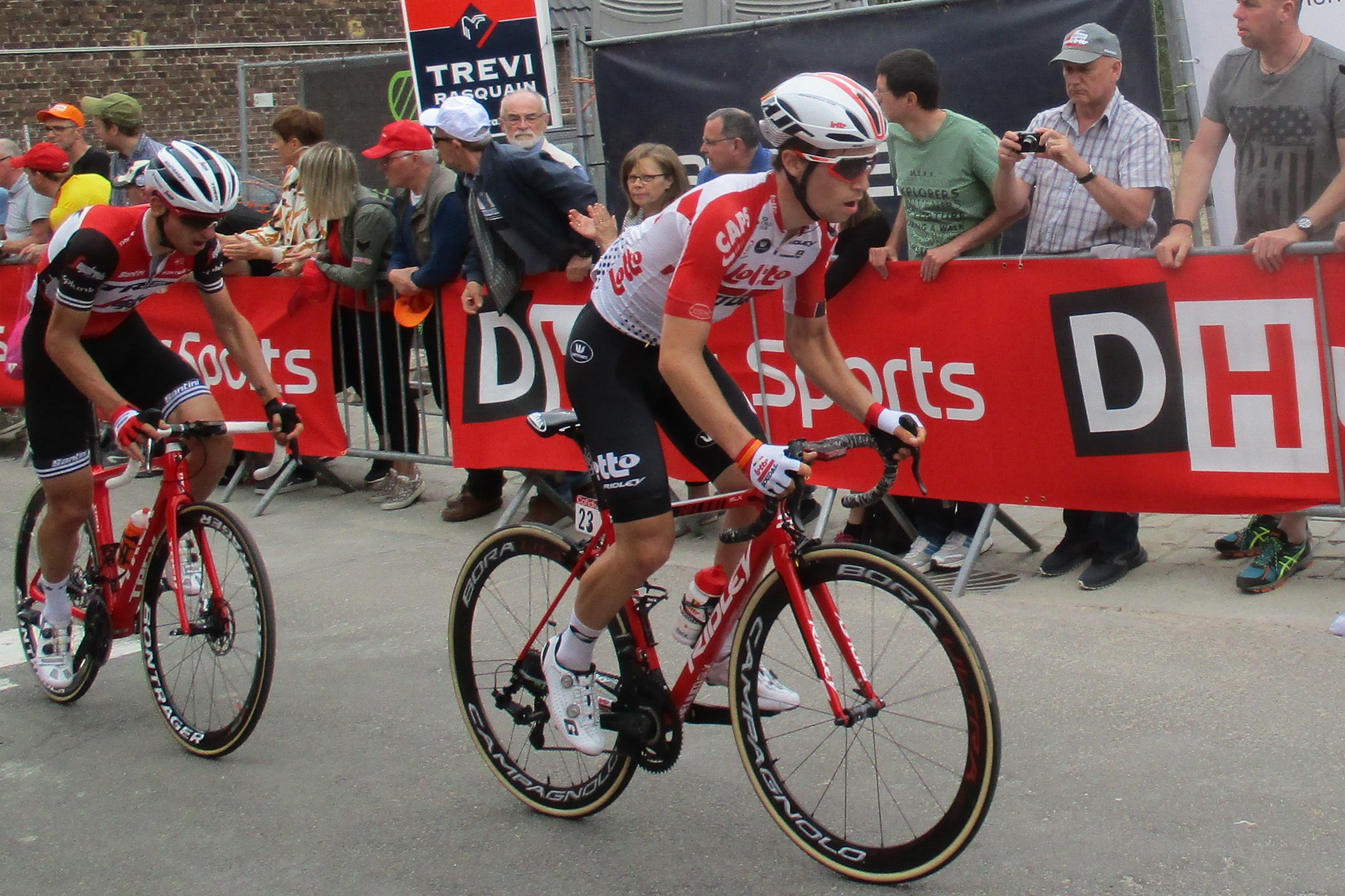 Tweede passage van de Waalse Pijl 2019 voor mannen op de Mur de Huy